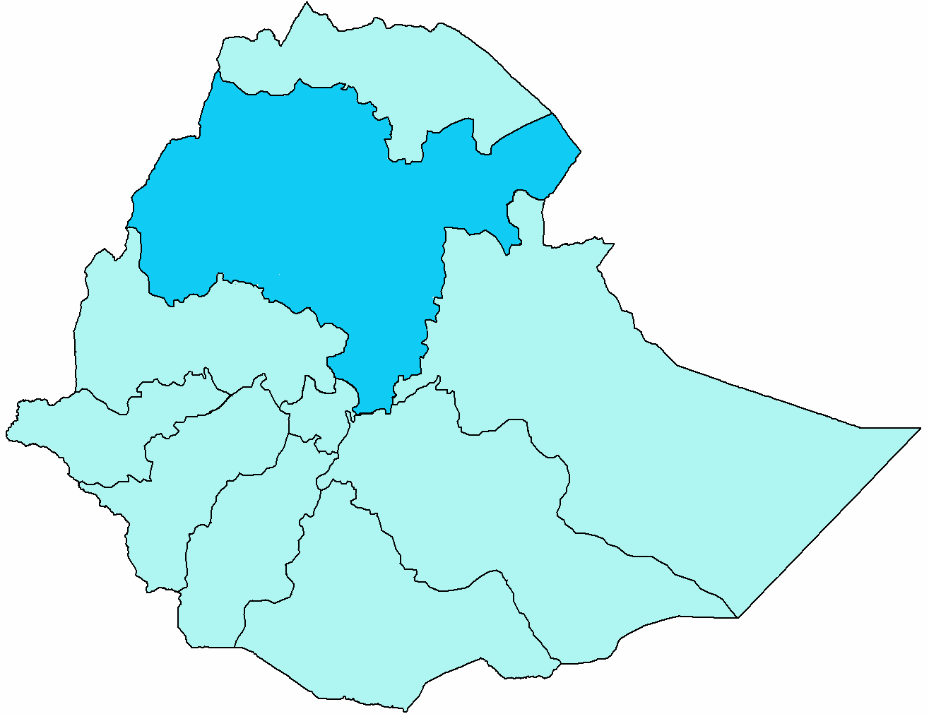 Mappa dell'arcieparchia cattolica di Addis Abeba, in Etiopia. Fonte per i confini della diocesi: Ethiopian Catholic Church